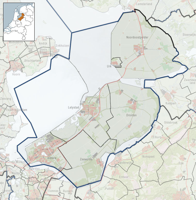 Referentiekaart van Provincie Flevoland, met indeling van gemeenten (2010) en impressie van het landschap. Door Jan-Willem van Aalst, samengesteld uit publiek beschikbare geo-data: Referentie-ondergrond (kustlijn, steden, wegen) gerasterd uit de OpenStreet Map OSM. ( Inhoud is beschikbaar onder de Creative Commons Attribution-ShareAlike 3.0 license. Referentie-ondergrond op water bewerkt vanuit Gebruik is vrij met bronvermelding NLR en ESA. Vectorgrenzen van gemeenten en regio's vrij ter beschikking gesteld met dank aan cartografen van brandweerregio's Hollands-Midden en IJsselland; gerasterd in Photoshop. Hoogte-aanduidingen (reliëf) gerasterd uit de AHN Viewer ( gebruik is vrij met bronvermelding (c) AHN, Overige kenmerken op de kaart: eigen tekenwerk van Jan-Willem van Aalst, op basis van gerasterde gemeentegrenzen.